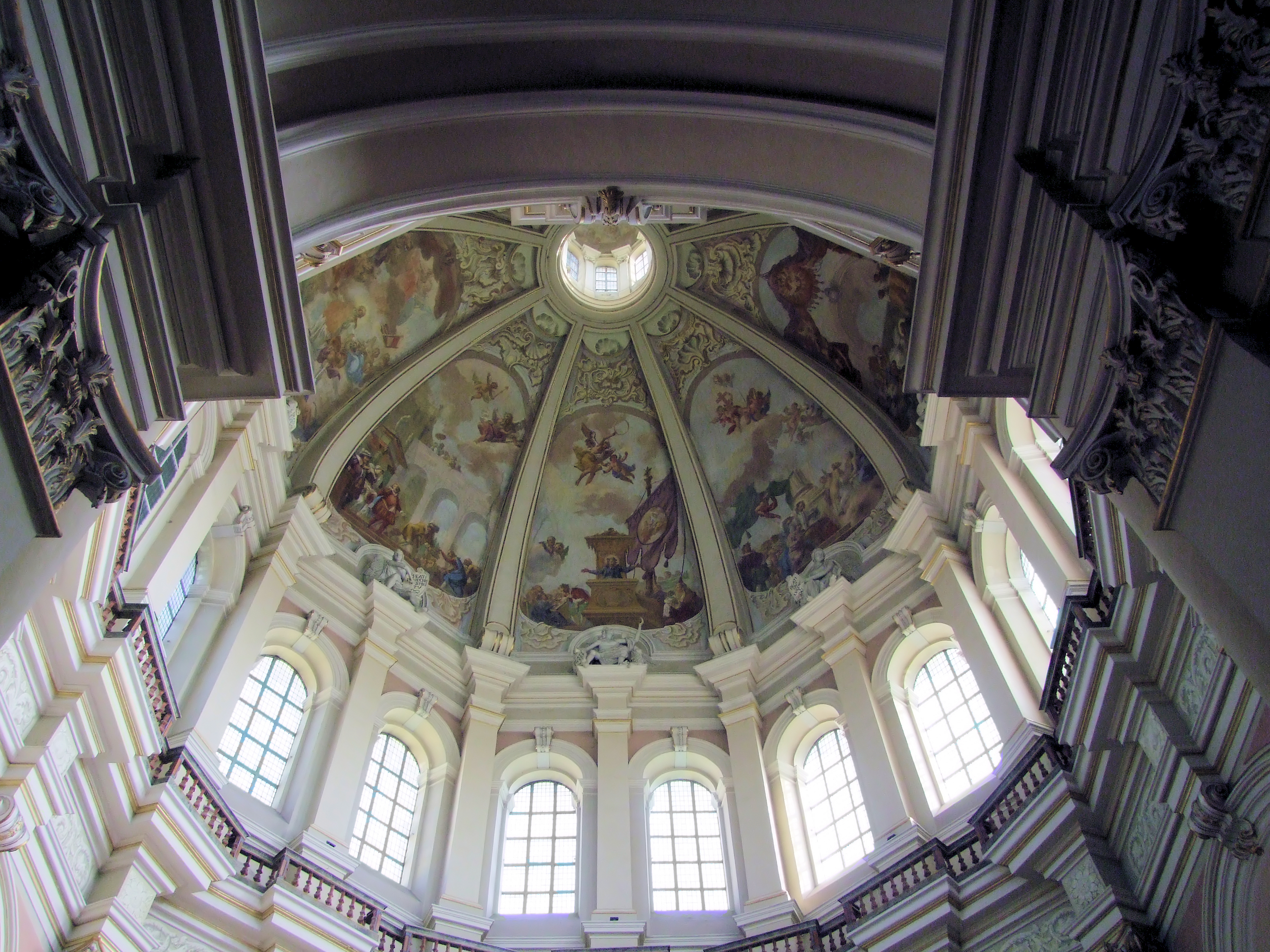 zespół klasztorny filipinów: kościół pw. Nawiedzenia NMP i św. Filipa Nereusza z lat 1675-1698, 1. połowy XVIII w., klasztor z lat 1732-1736, szpital z XVIII w., dom mieszkalny i stajnia z XVIII, XIX w., ogrodzenie z bramą z połowy XVIII w., kapliczka w ogrodzeniu z XVIII w. Głogówko-Święta Góra, Piaski